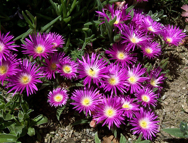 Plante d'Afrique du sud de 5 à 10 cm. Zone 5 (photo en culture)